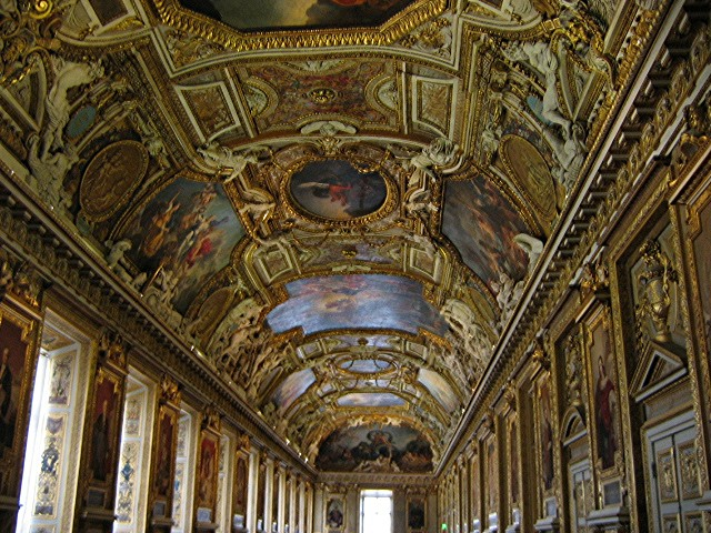 Deckenausmalung der Apollogallerie von Charles Lebrun, urprl. Versailles, jetzt Louvre, Öl auf Leinwand, an die Decke appliziert.